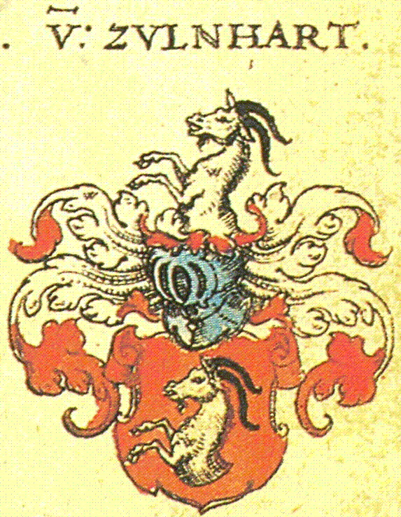 Wappen der schwäbischen Familie von Zulnhart (Züllnhart) nach Siebmachers Wappenbuch, Blatt 110, 15.